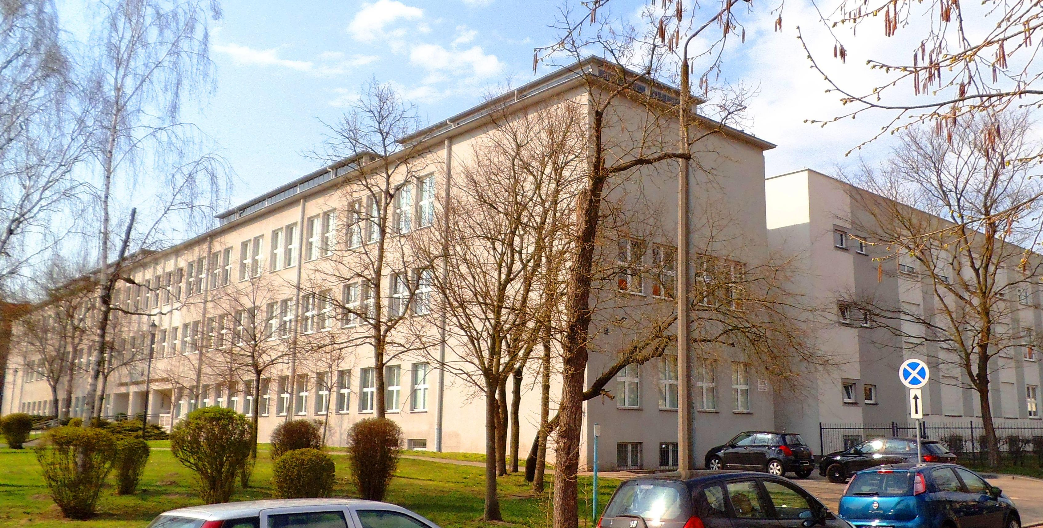 Budynek Wydziału Matematyki i Informatyki UMK w Toruniu